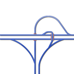 Een schema van een half windmolenknooppunt, gemaakt door mezelf.